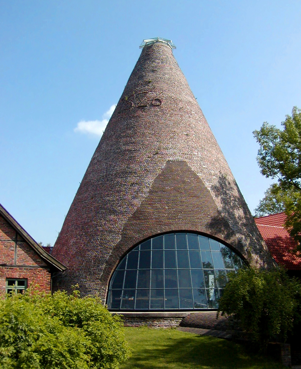 Glashütte Gernheim in Petershagen This image shows a heritage building in Germany, located in the North Rhine-Westphalian city Petershagen (no. 1).